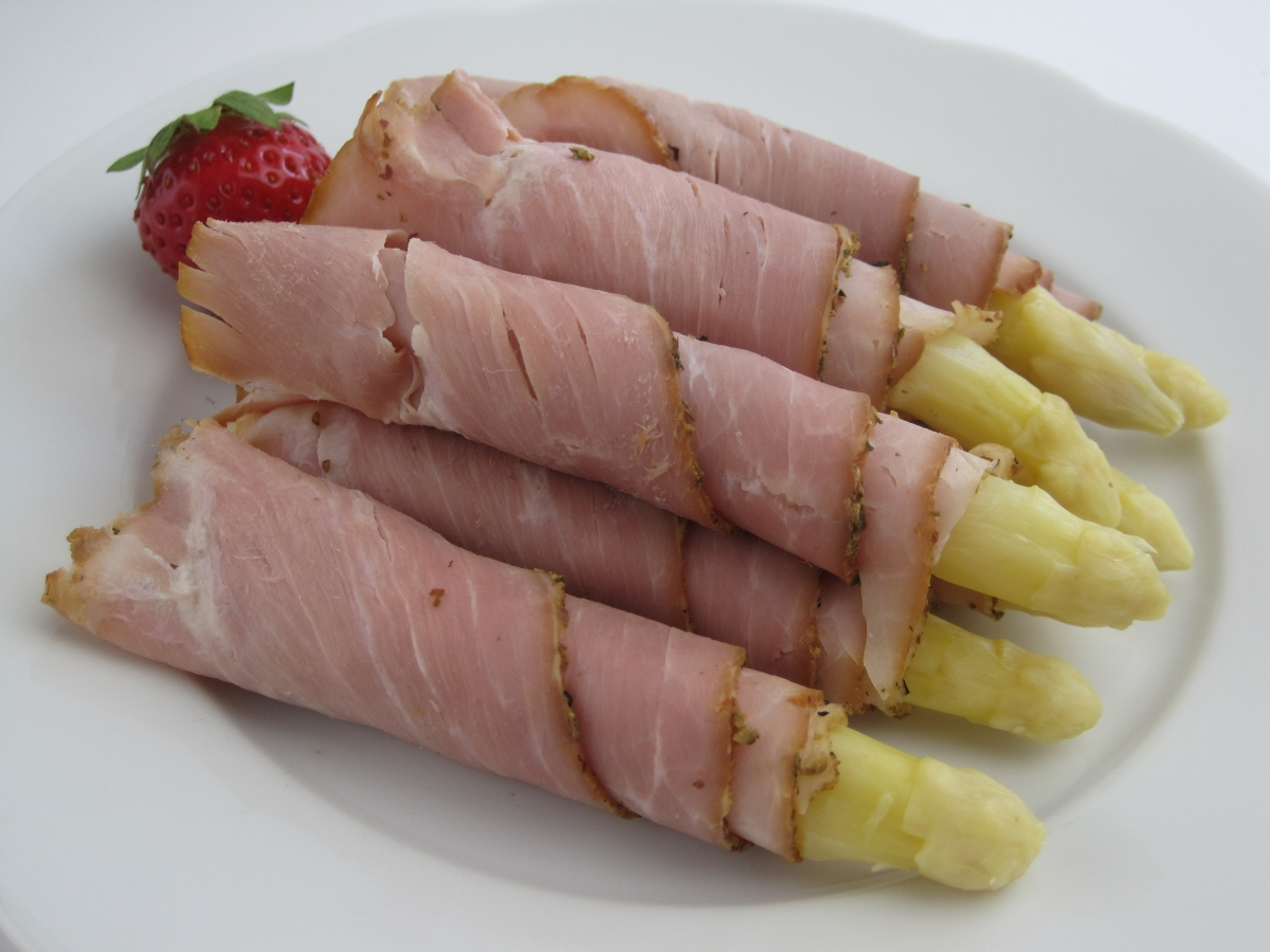 Schinkenröllchen, ganz klassisch mit Spargel